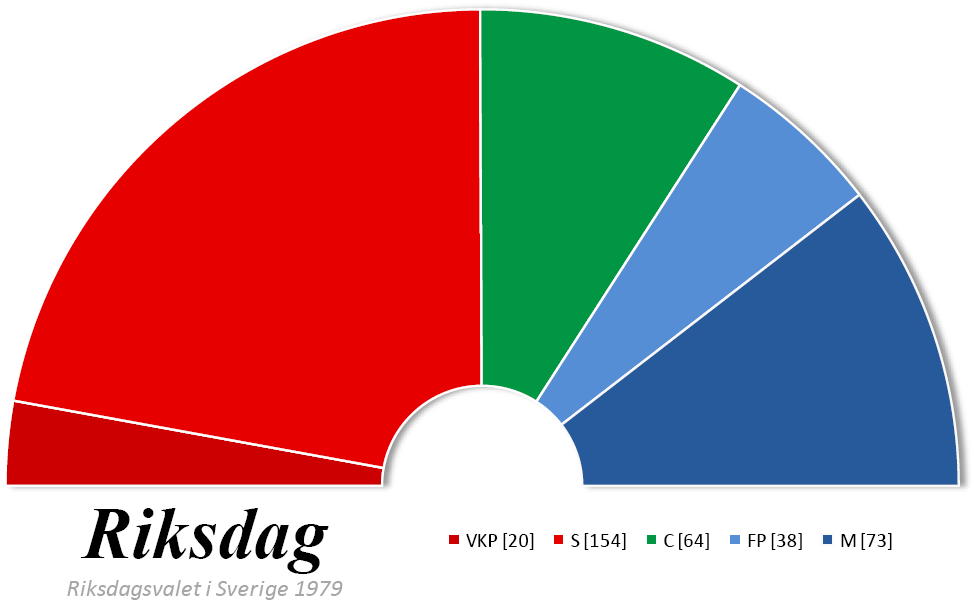 Composition du Riksdag suédois après les élections générales de 1979